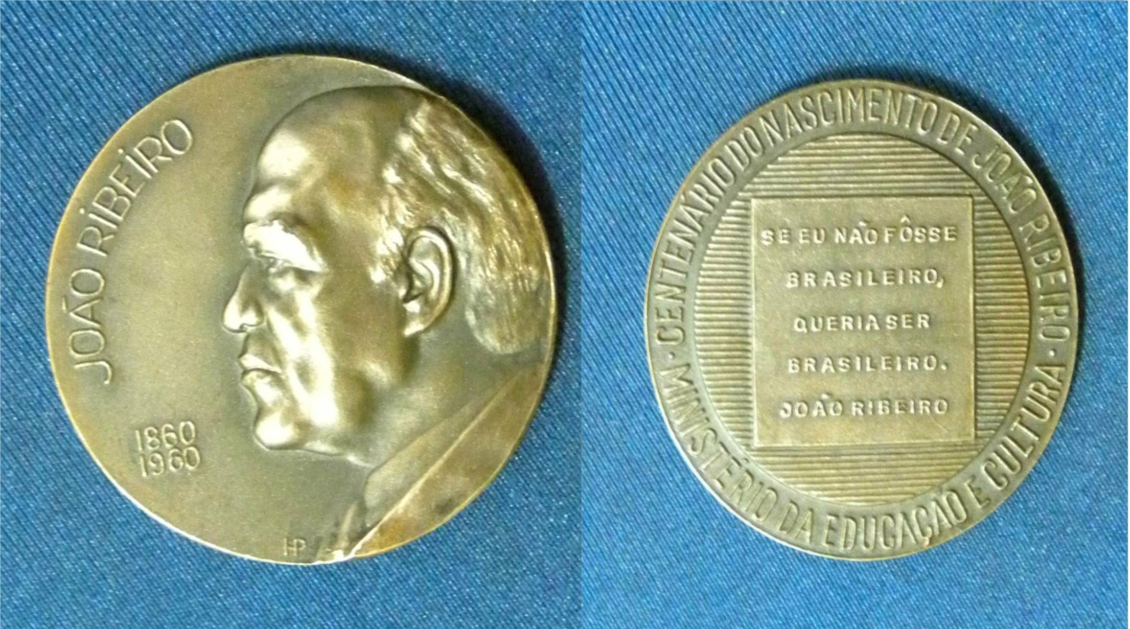 Medalha comemorativa do Centenário de nascimento de João Ribeiro - jornalista, crítico literário, filólogo, historiador, pintor e tradutor brasileiro